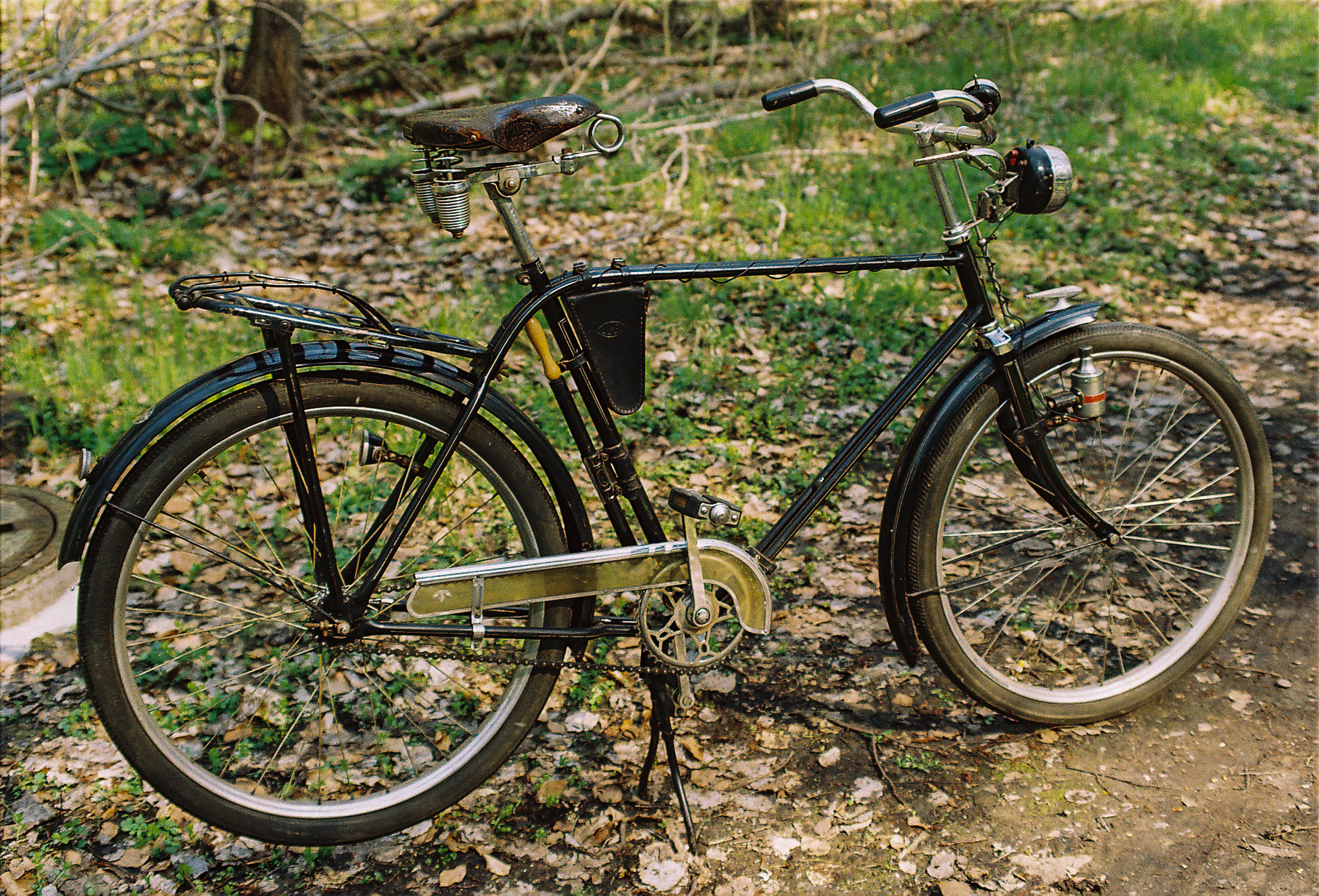 Opel- Fahrrad Baujahr 1935 mit Doppelschleifen- Rohrrahmen.